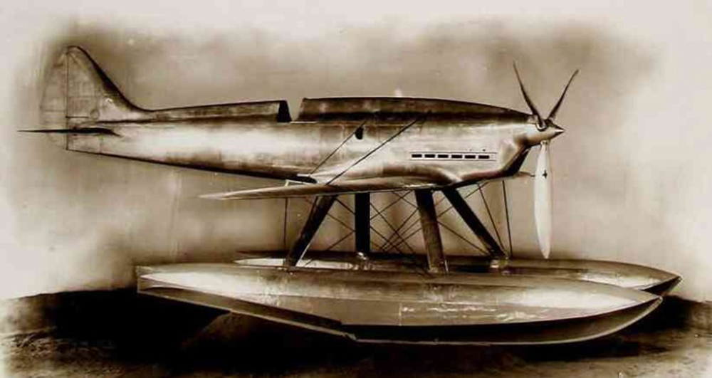 Dewoitine HD.411 moteur Lorraine 12Rcr Radium